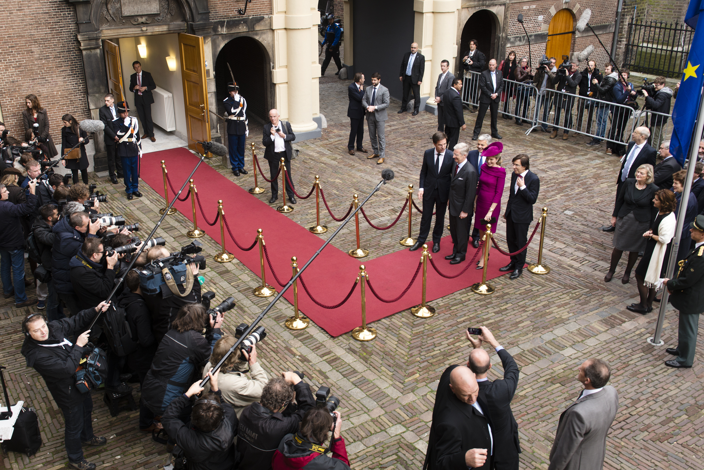 Minister-president Rutte ontvangt de Belgische Koning Filip en Koningin Mathilde voor een eerste kennismaking. Zij werden daarbij vergezeld door minister-president Di Rupo. In België is het gangbaar dat de premier bij dergelijke bezoeken meereist met het Koninklijke paar. Kennismakingsbezoeken door het Nederlandse Koningspaar worden doorgaans begeleid door de minister van Buitenlandse Zaken. De ontmoeting met premier Rutte sluit het eendaagse bezoek van het Belgische Koningspaar aan Nederland af. Vanochtend is het Koningspaar ontvangen op Paleis Noordeinde door Koning Willem-Alexander en Koningin Máxima. Na de lunch bezochten Koning Filip en Koningin Mathilde de Staten-Generaal.